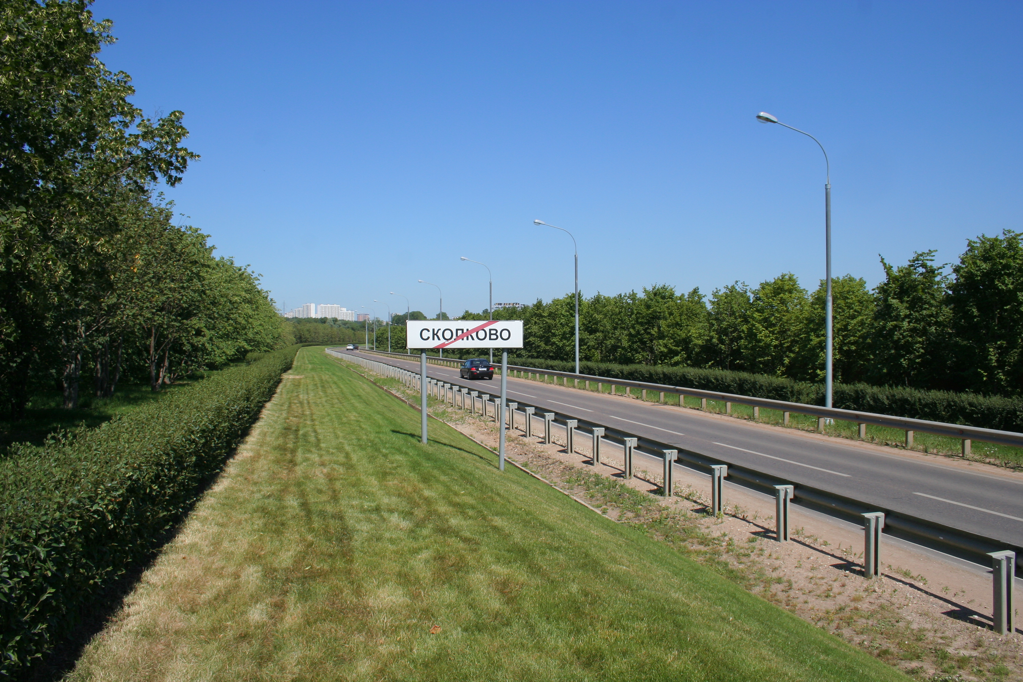 Hauptstraße des Dorfes Skolkowo, Oblast Moskau, Russland.